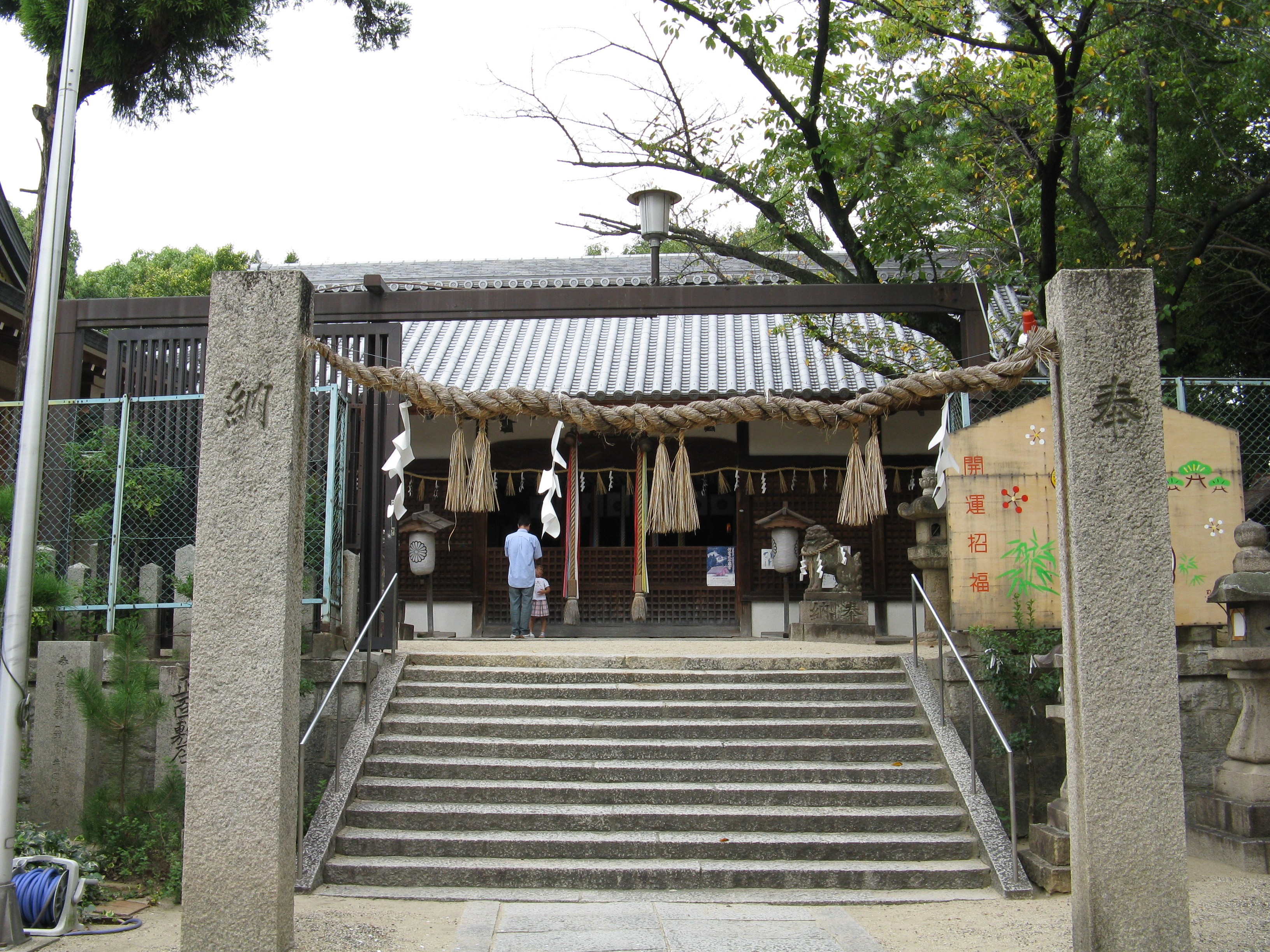 柴籬神社